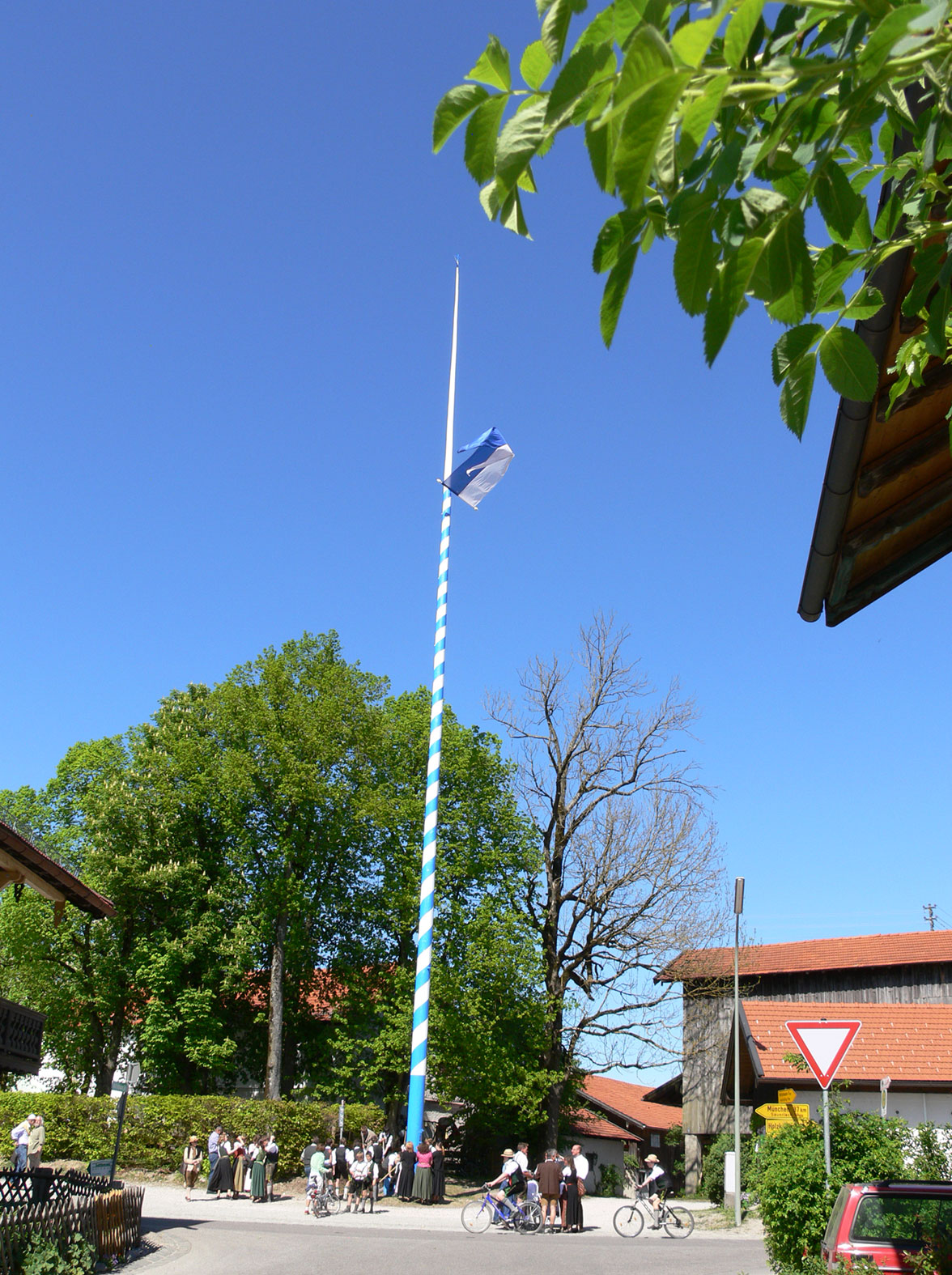 Maibaumaufstellen Dietramszell 2007